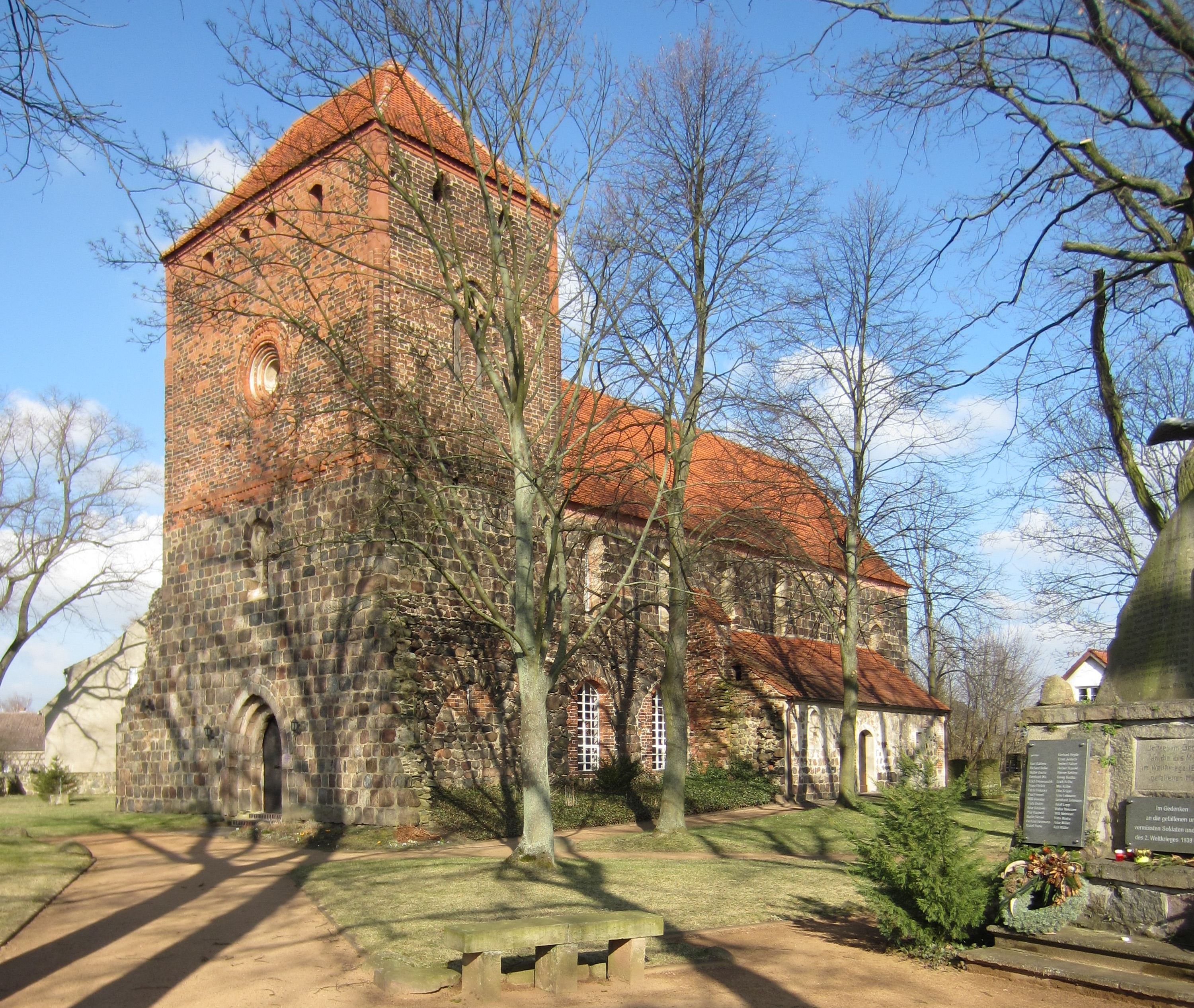 Massen, Gemeinde Massen-Niederlausitz, denkmalgeschützte Dorfkirche, Ansicht von Südwesten